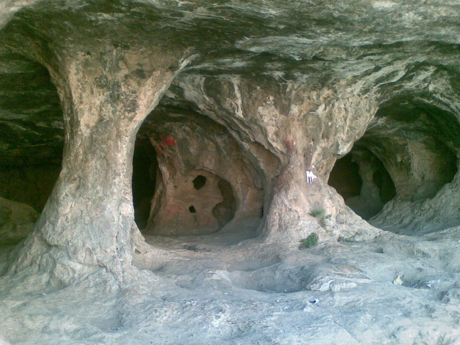 Halilim Wadi Near Mevaseret Zion, Israel מערות בנחל חלילים . נחל חלילים הוא נחל אכזב מצוקי מרשים שאורכו כקילומטר וחצי. הנחל יורד משוליה הצפוניים של מבשרת ציון מזרחה אל נחל שורק, העובר בעמק הארזים (שם עובר שביל ירושלים)